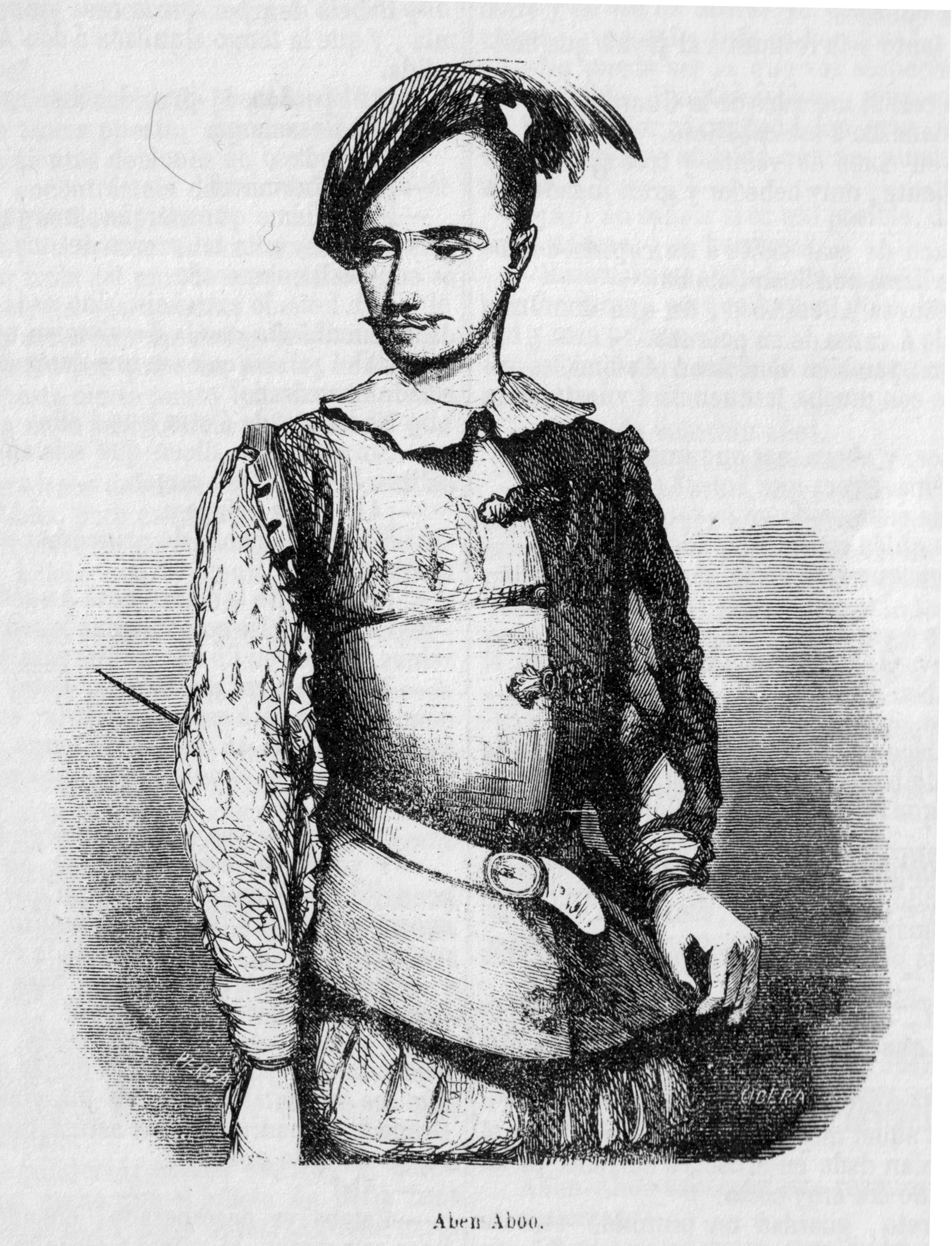 Aben Aboo